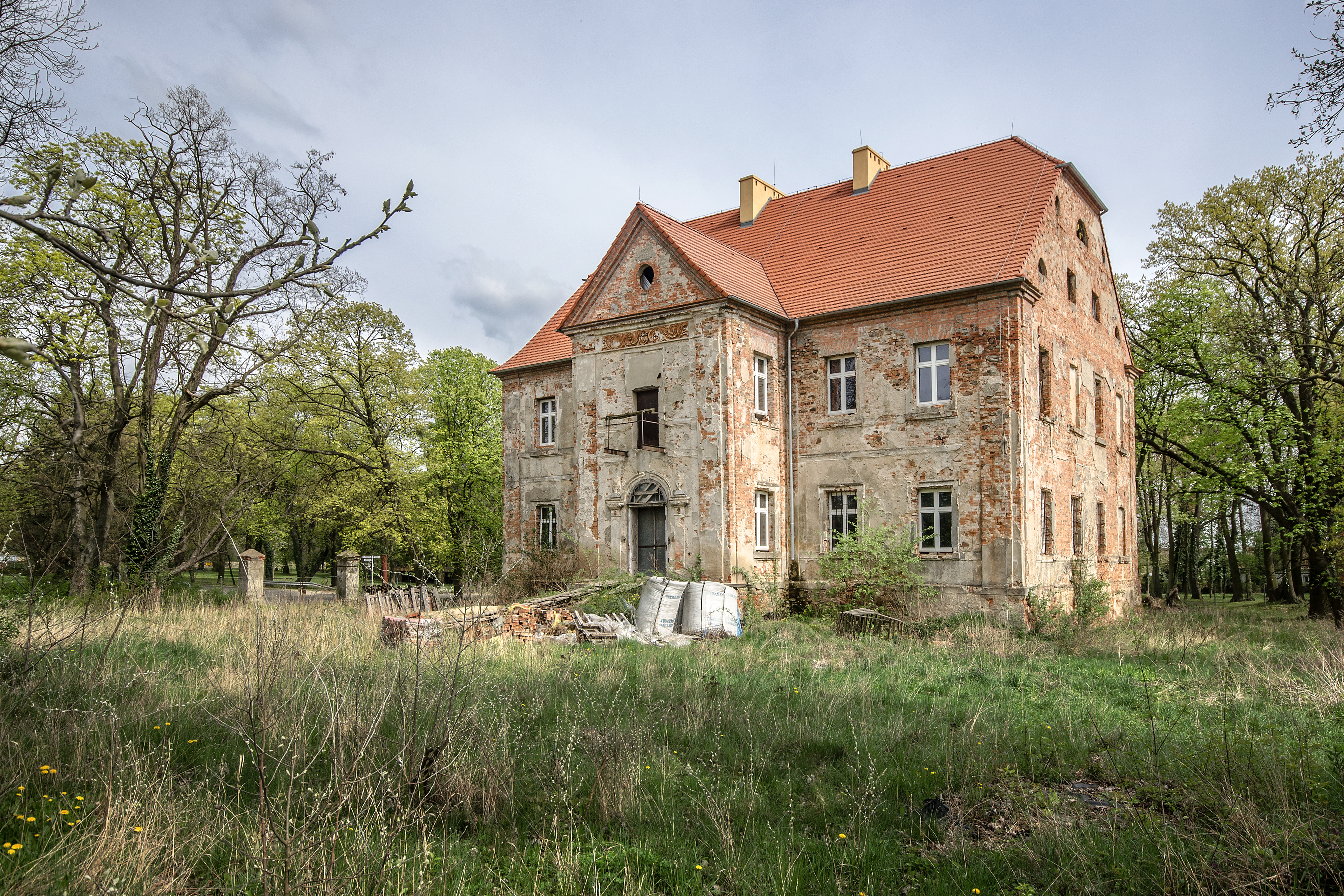 Naroczyce, pałac (ruina), 1737, 1888